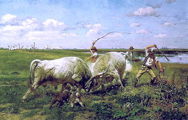 Ki a legerősebb? Verekedő bikák. Vastagh Géza (1866-1919) festménye.